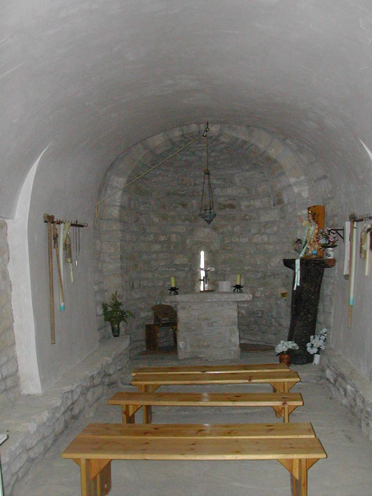 Interior de l'església romànica de Sant Salvador de la Serra, al municipi de Sant Esteve de la Sarga (Pallars Jussà)